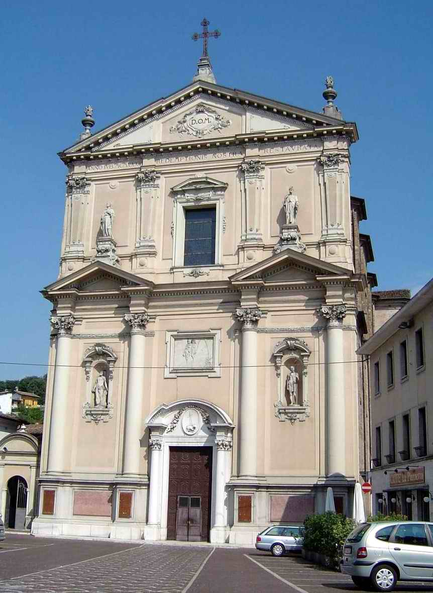 Facciata d'ingresso della Chiesa parrocchiale di Carpenedolo, dedicata a San Giovanni Battista.